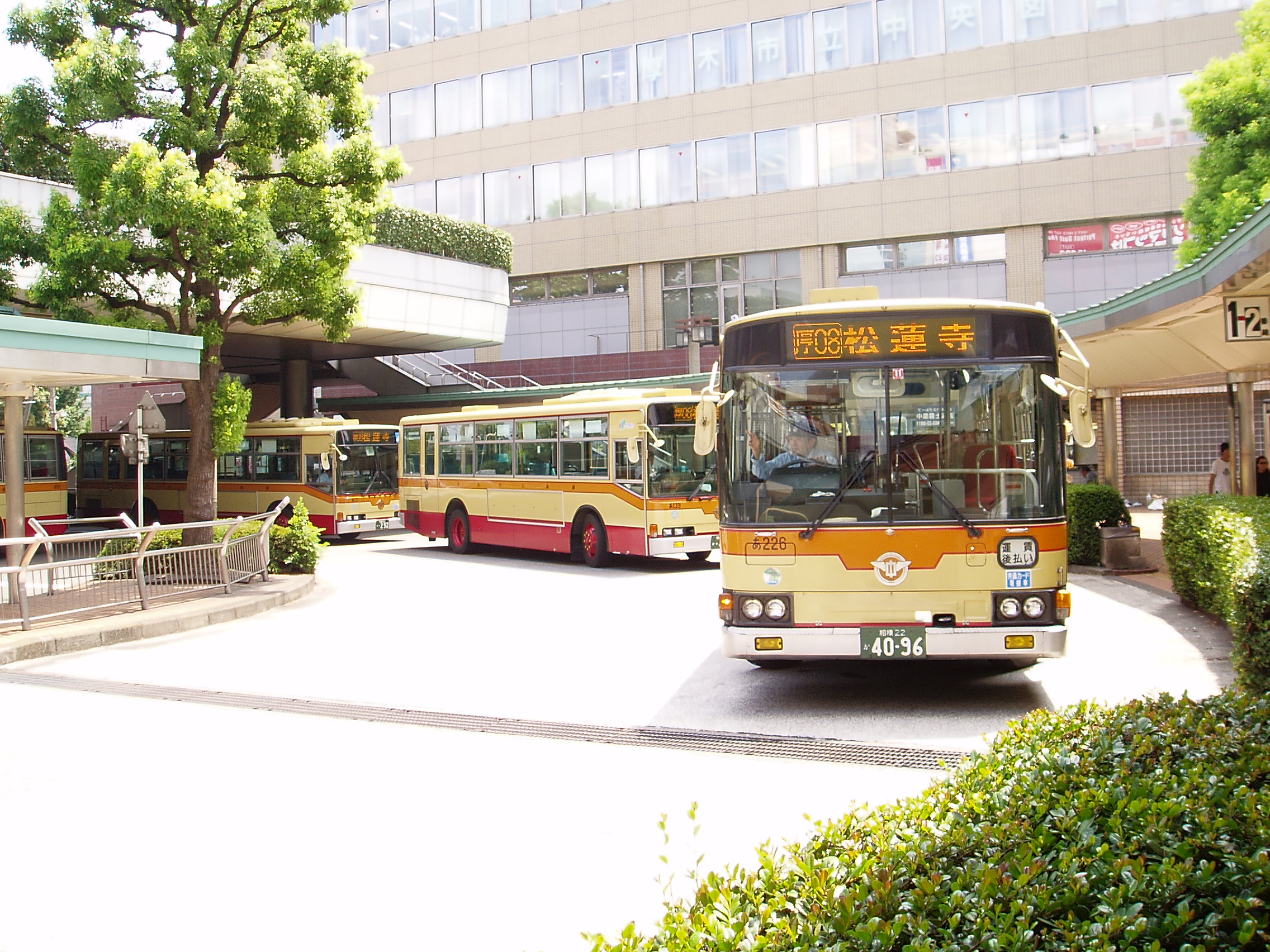 Atsugi Bus Center